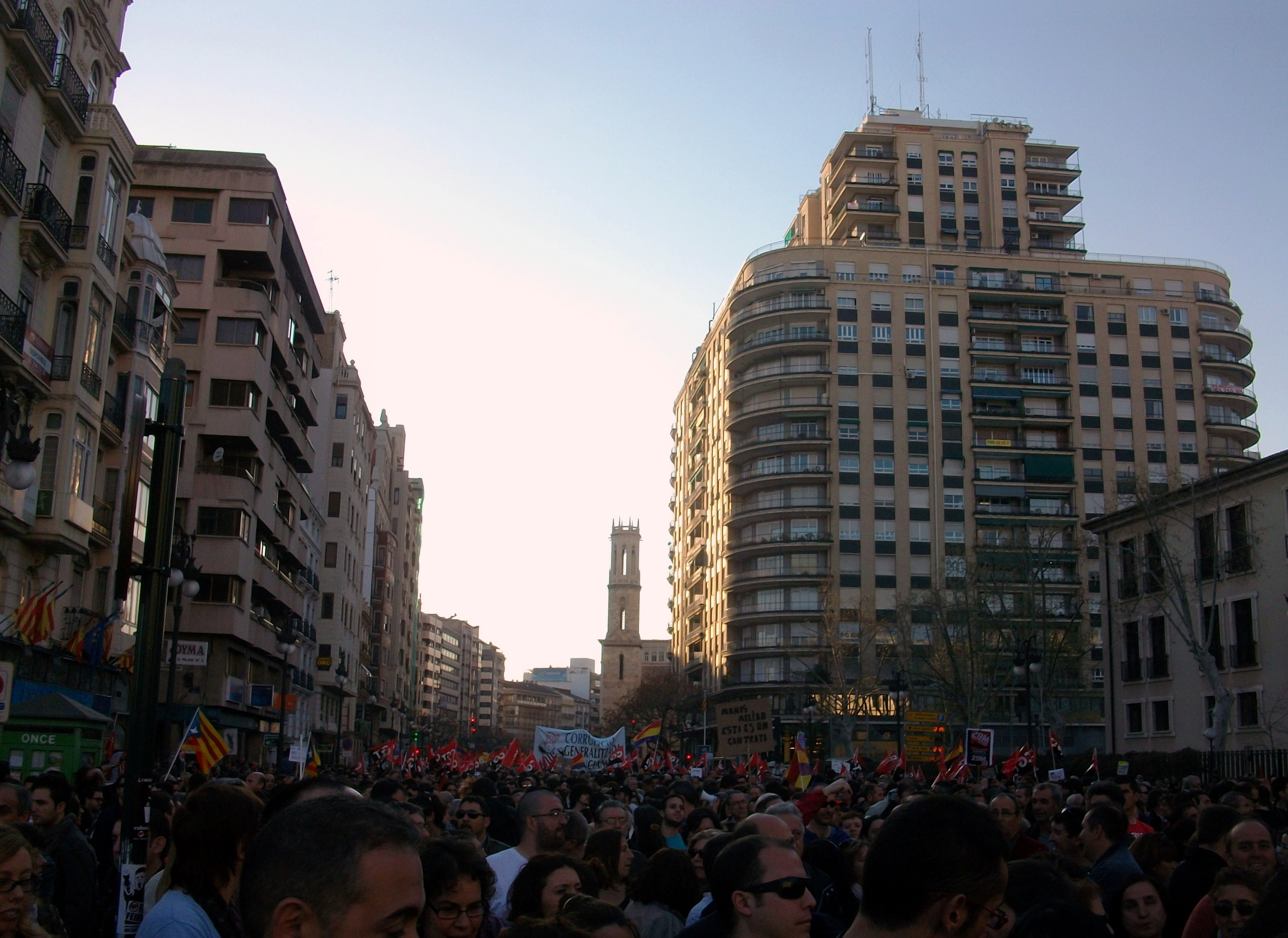 Manifestació per la vaga general del 29 de març de 2012, carrer de Xàtiva de València.